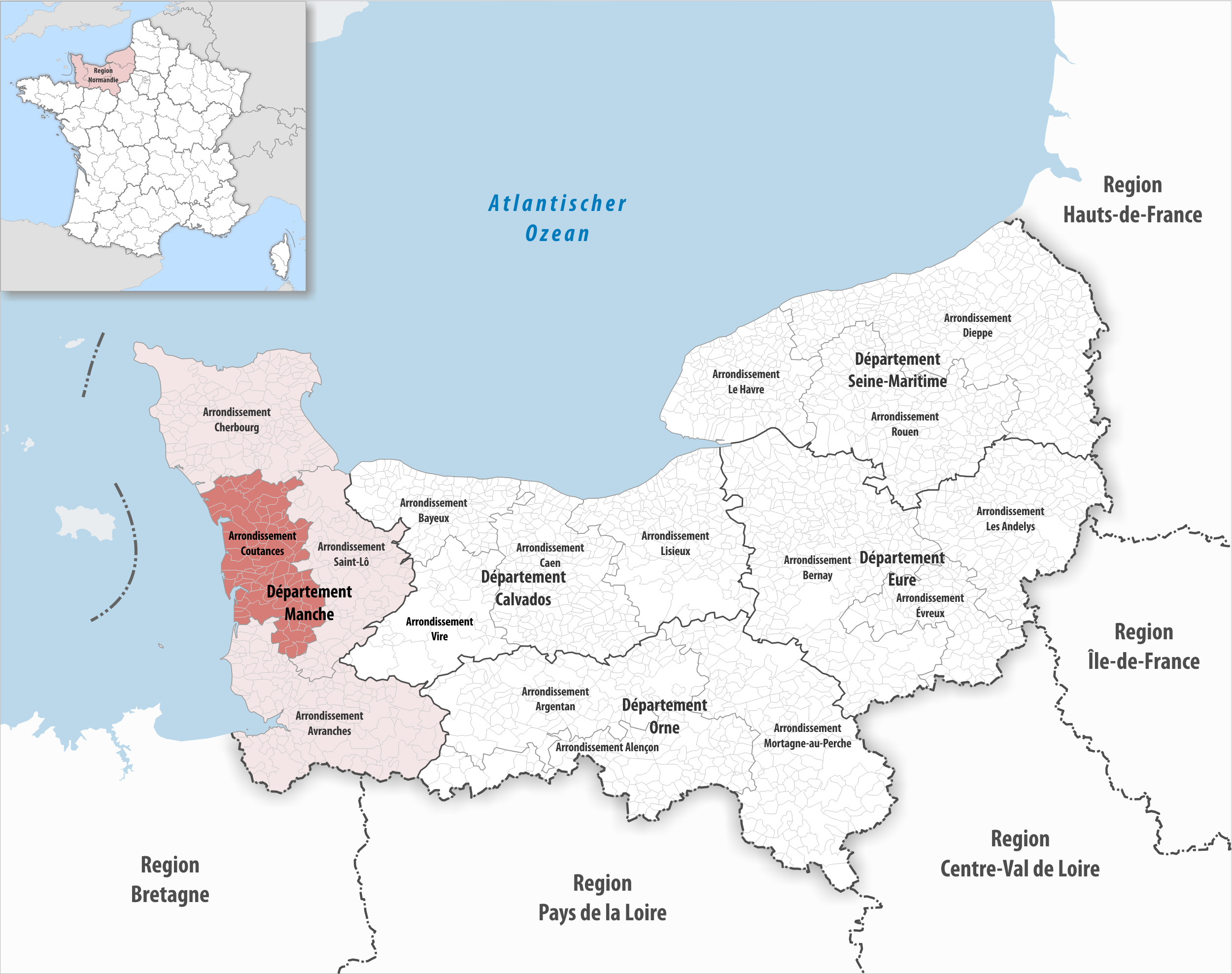 Lage des Arrondissements Coutances